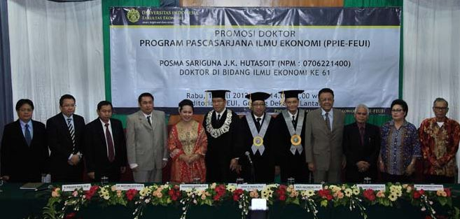 Promosi Doktor FEUI